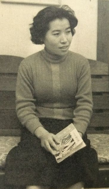 深井迪子（作家。深井人詩の妻）